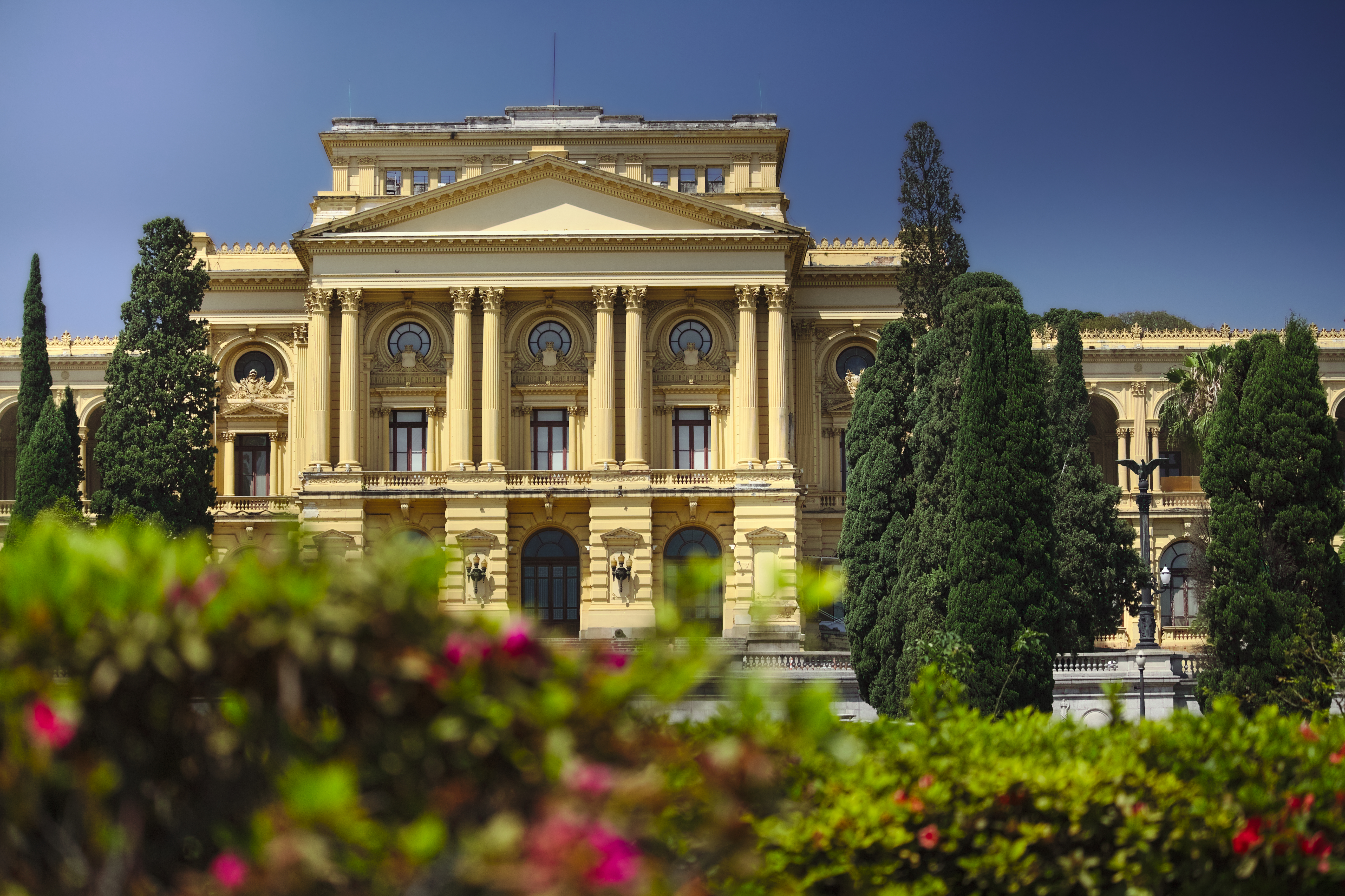 Fachada do Museu Paulista, também conhecido como Museu do Ipiranga, vista dos seus jardins. Conjunto do Ipiranga: Museu Paulista, Monumento à Independência, Casa do Grito e Parque da Independência